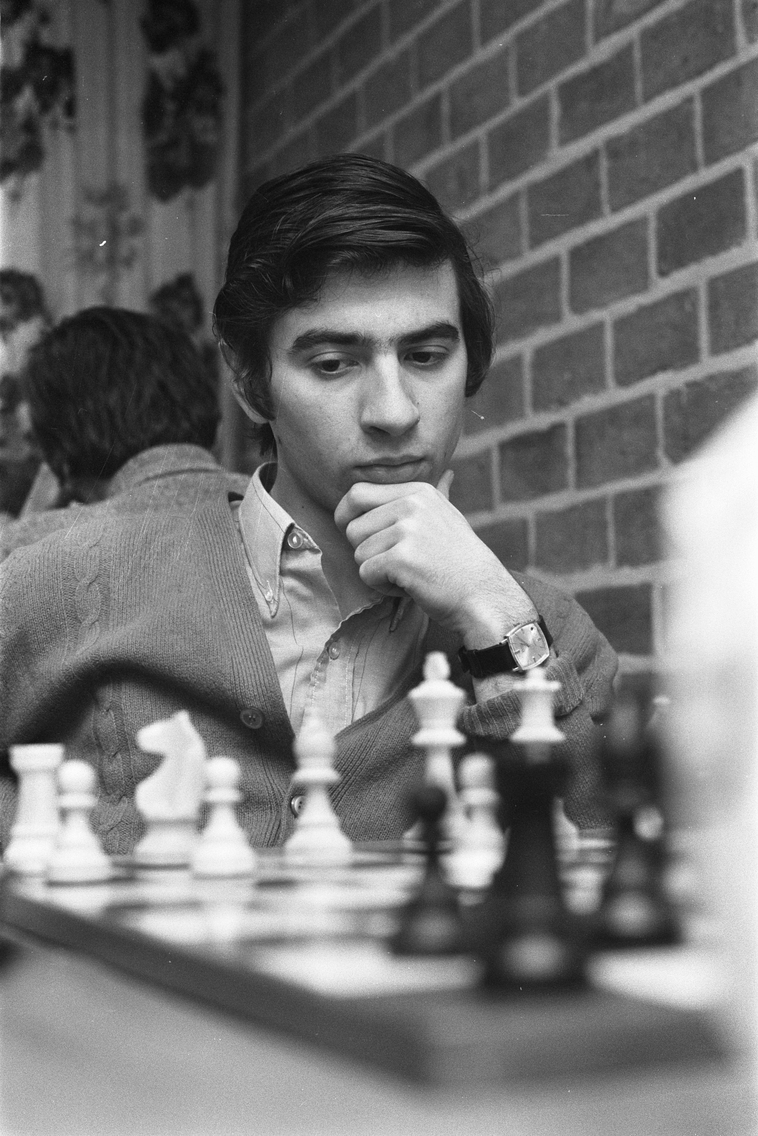 Collectie / Archief : Fotocollectie Anefo Reportage / Serie : [ onbekend ] Beschrijving : Hoogovenschaaktoernooi, Ljubojevic (Joegoslavie) kop Datum : 11 januari 1972 Locatie : Joegoslavië Trefwoorden : schaken Instellingsnaam : Hoogovenschaaktournooi Fotograaf : Verhoeff, Bert / Anefo Auteursrechthebbende : Nationaal Archief Materiaalsoort : Negatief (zwart/wit) Nummer archiefinventaris : bekijk toegang 2.24.01.05 Bestanddeelnummer : 925-3014